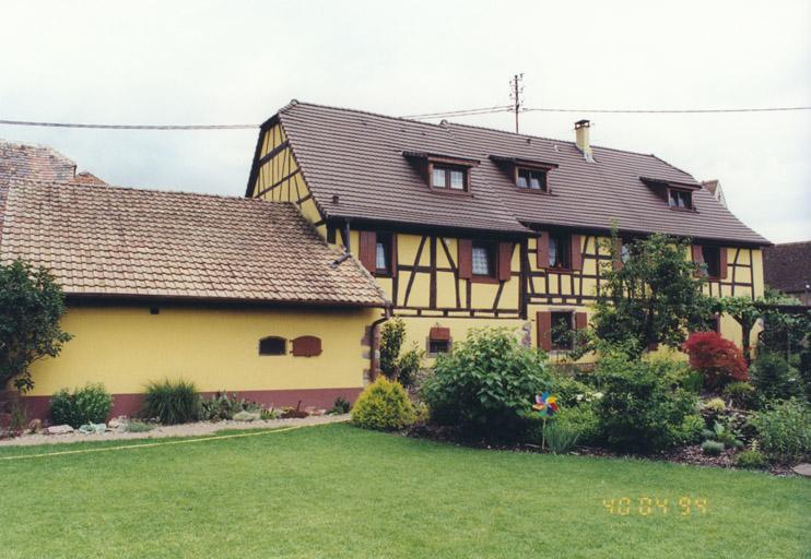 Ferme 23 rue principale 68320 muntzenheim